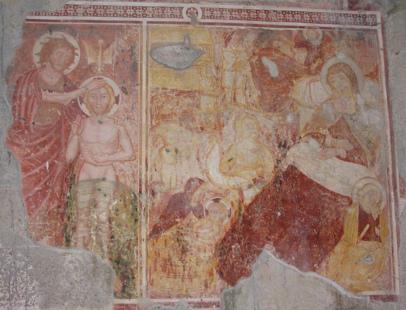 Natività, affresco del XIV secolo, che è stato attribuito al "Maestro del 1388". Chiesa di San Giorgio in Lemine (ad Almenno San Salvatore, Bergamo). Fotografia di Giorces.